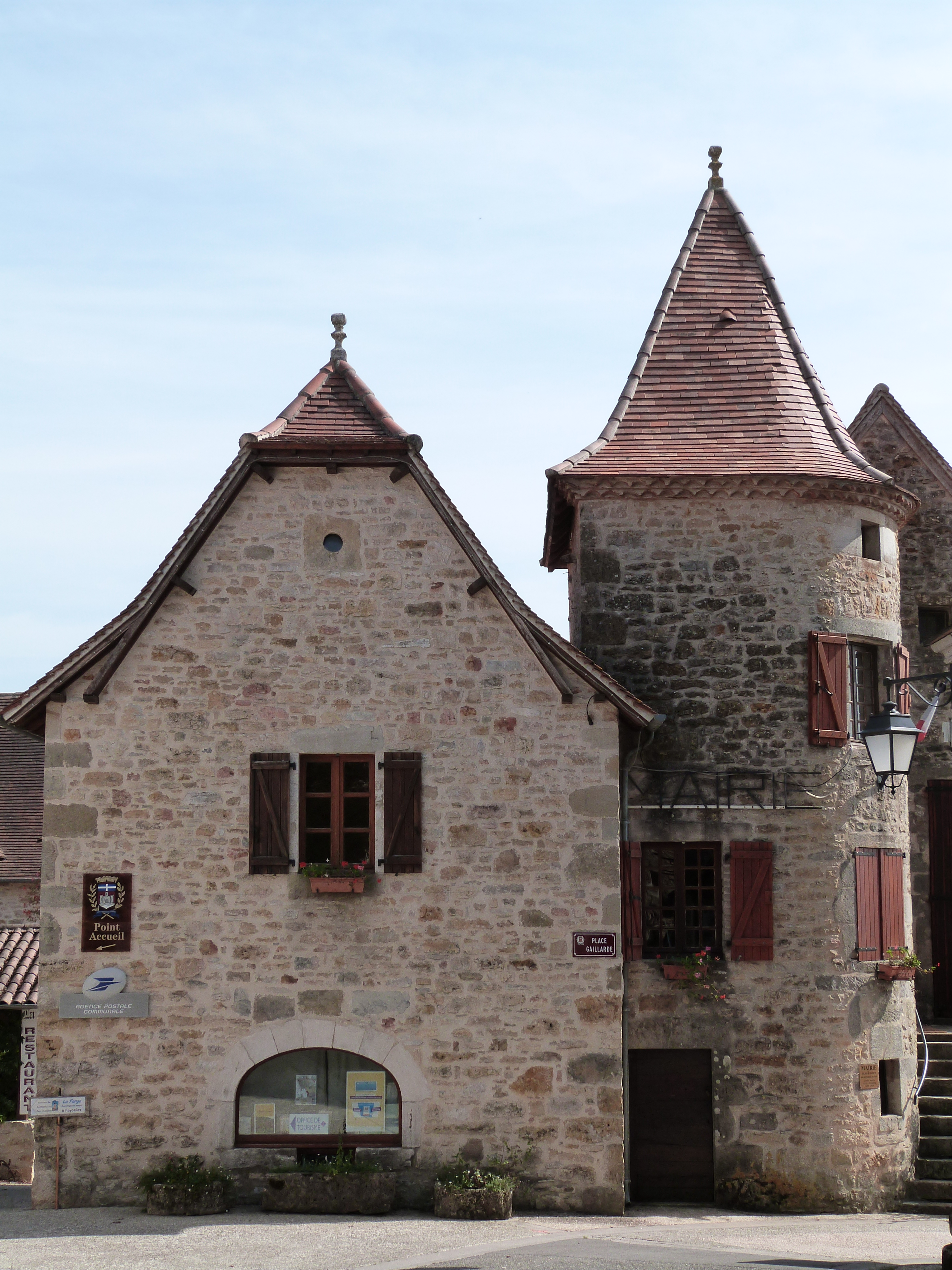 Mairie située place Gaillarde